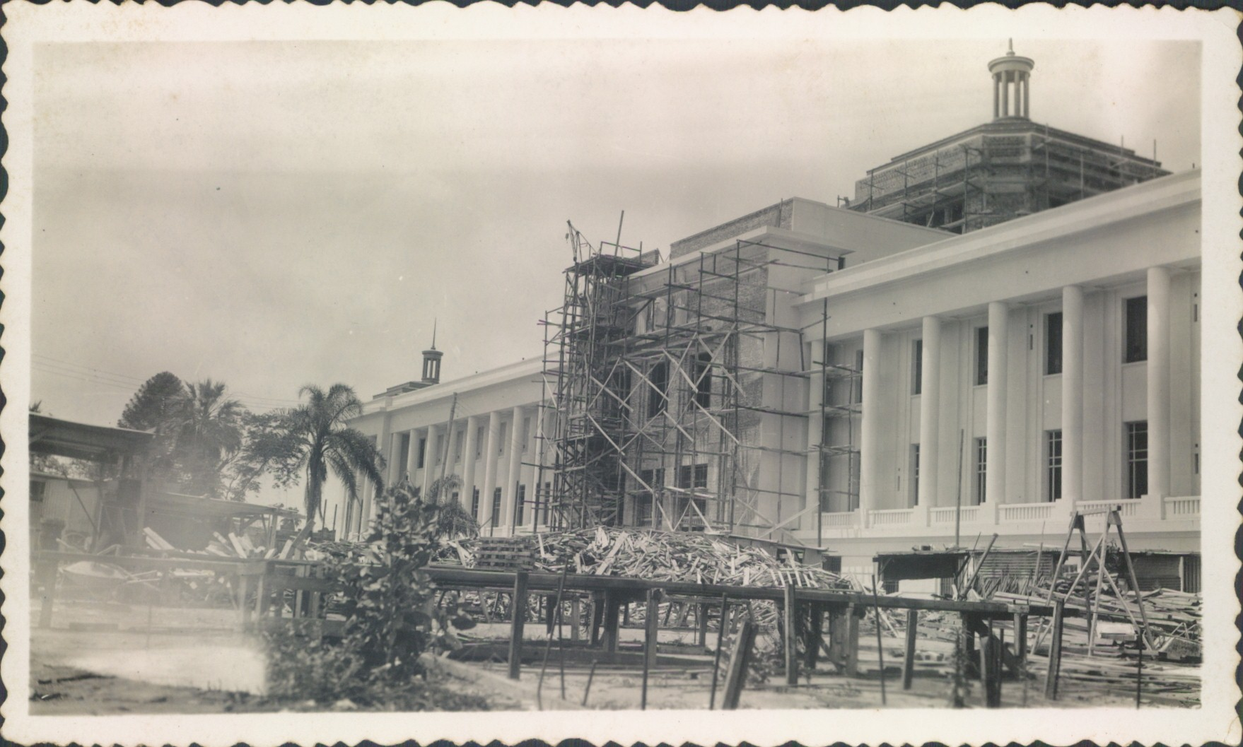 Work in progress of Justice Palace of Tucumán. 1938.